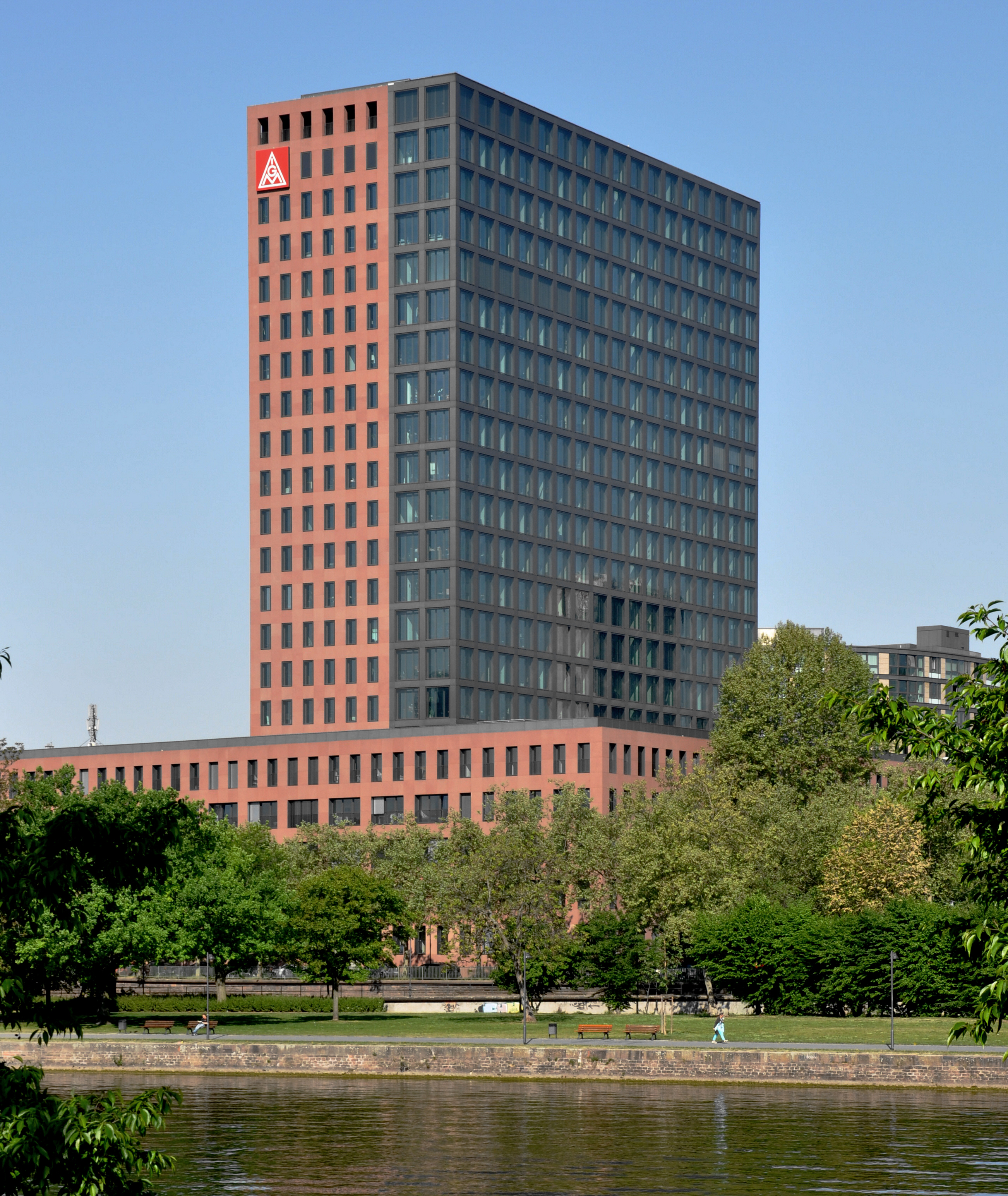 Frankfurt am Main, Blick vom Schaumainkai zum Main Forum (IG Metall)